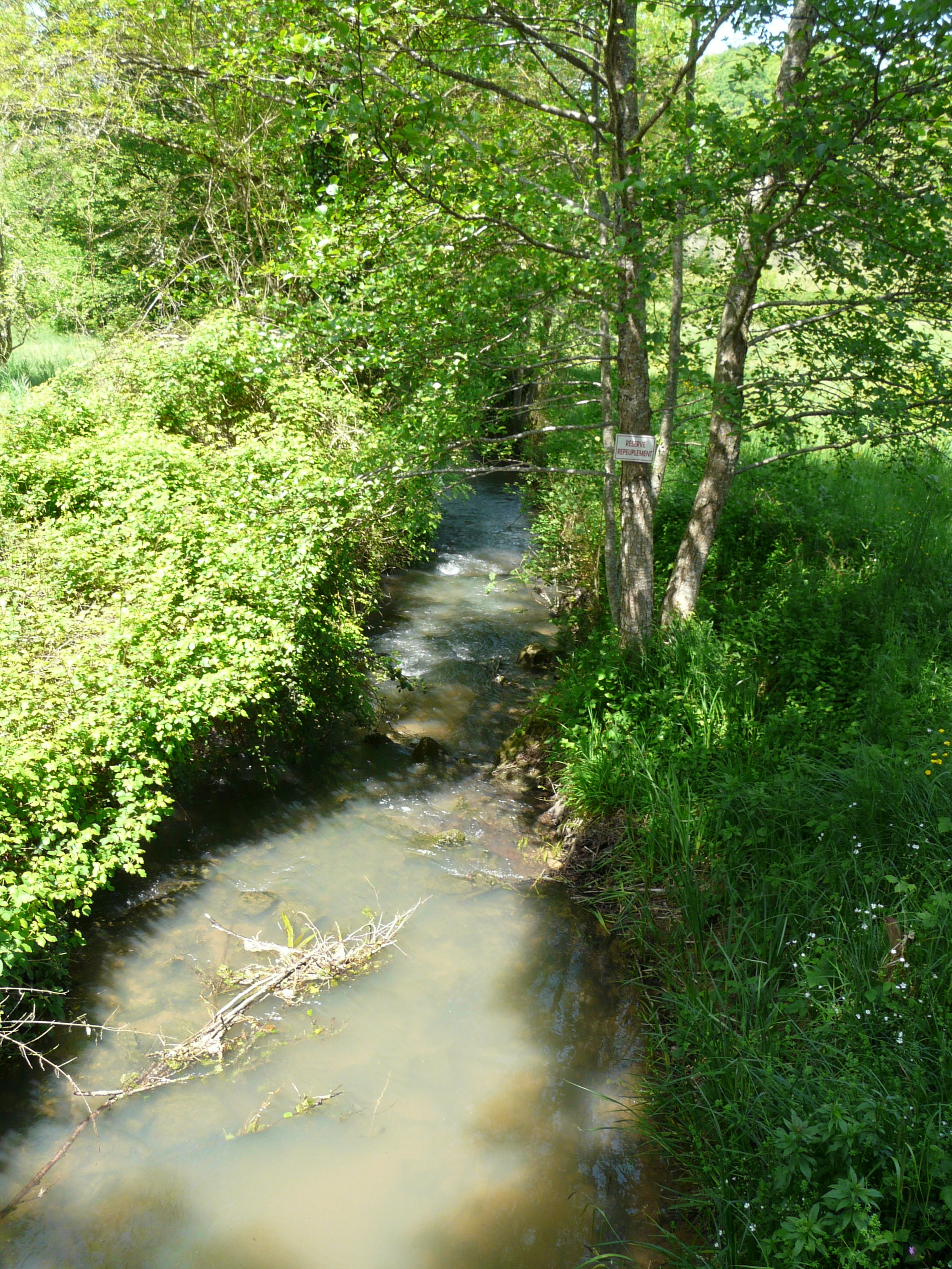 La Couze en contrebas du village de Montferrand-du-Périgord, Dordogne, France. Vue prise vers l'aval.